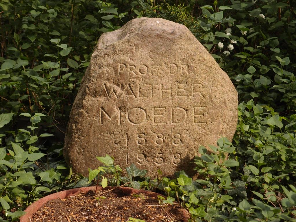 Grab des Arbeitspsychologen Walther Moede (1888-1958) auf dem Friedhof In den Kisseln in Berlin-Spandau.